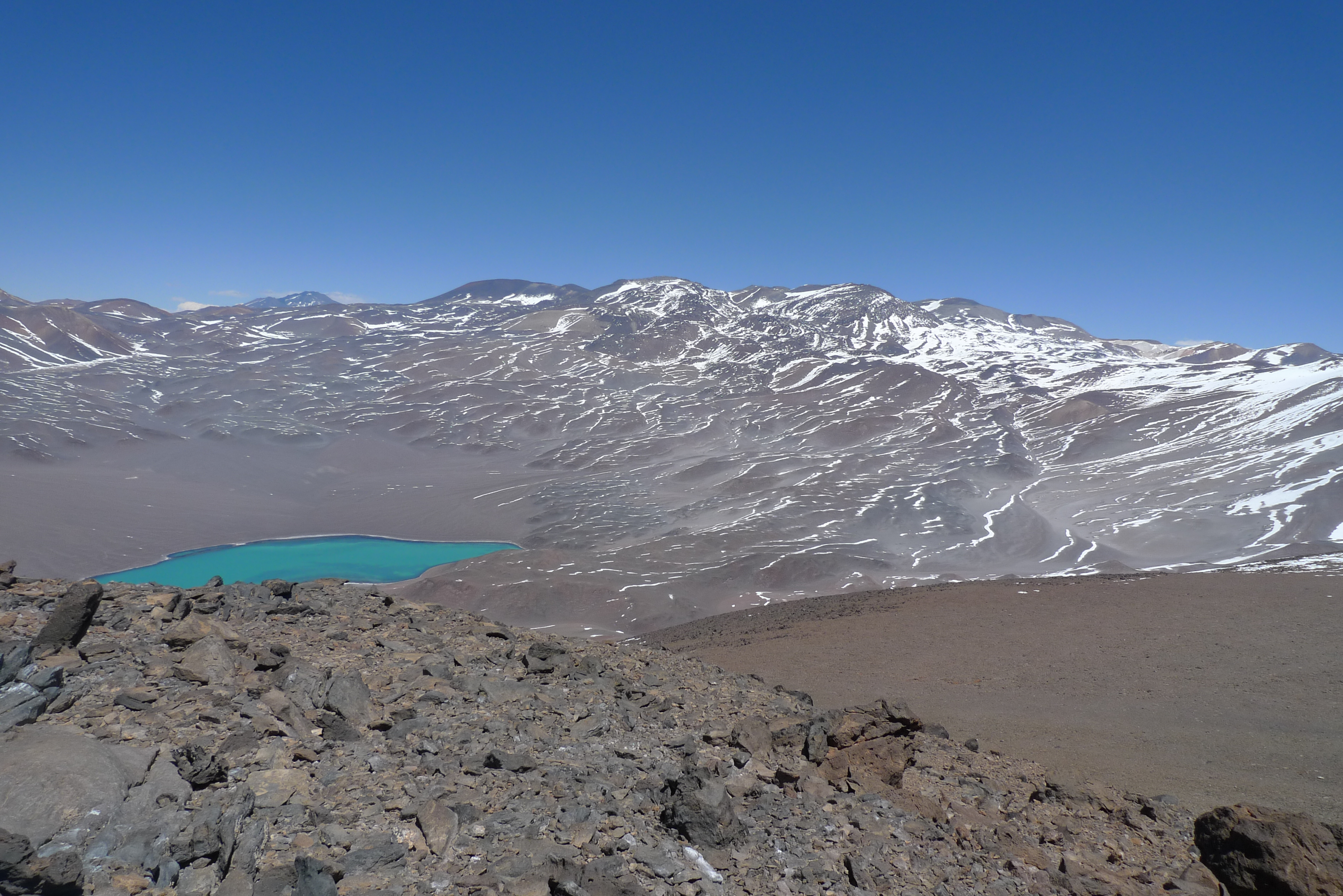 Vista para o complexo vulcânico do Sierra Nevada desde o cume do Vulcão Paso Cerrado, Chile.